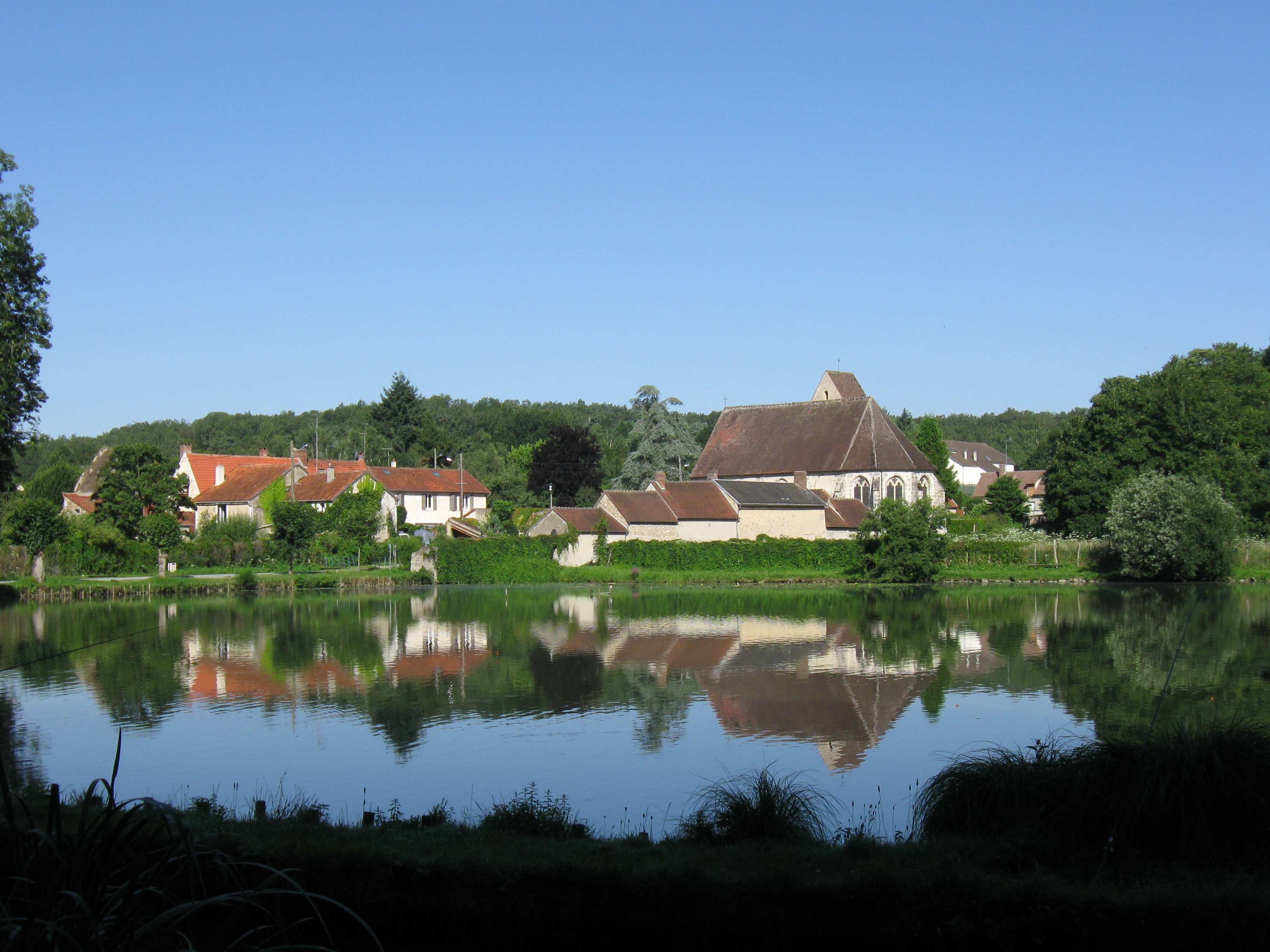 Saint Hilarion et son étang artificiel sur le cours de la Guéville (département des Yvelines, région Île-de-France)